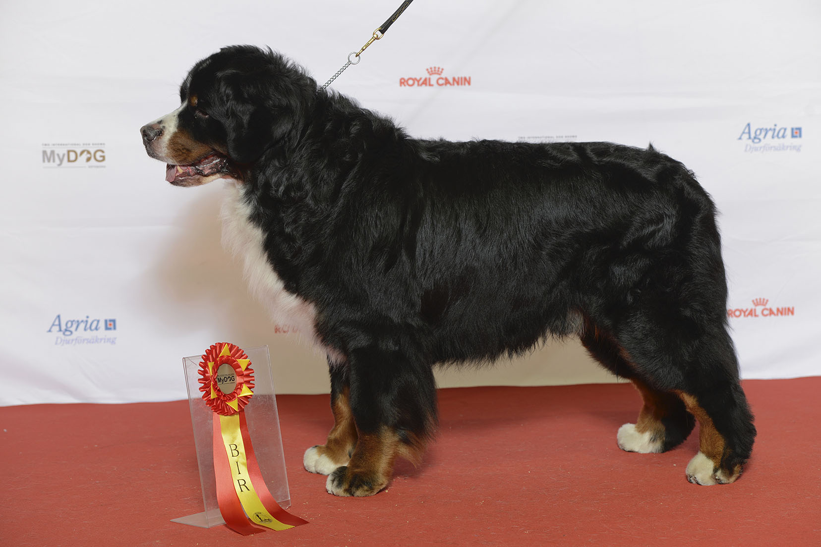 Grupp 2 BERNER SENNENHUND, FI UCH SE UCH Berntiers On Demand MyDOG, Nordens största hundevenemang